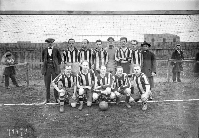 Equipe de football du Racing Club de Roubaix le 22 janvier 1922 à Asnières-sur-Seine